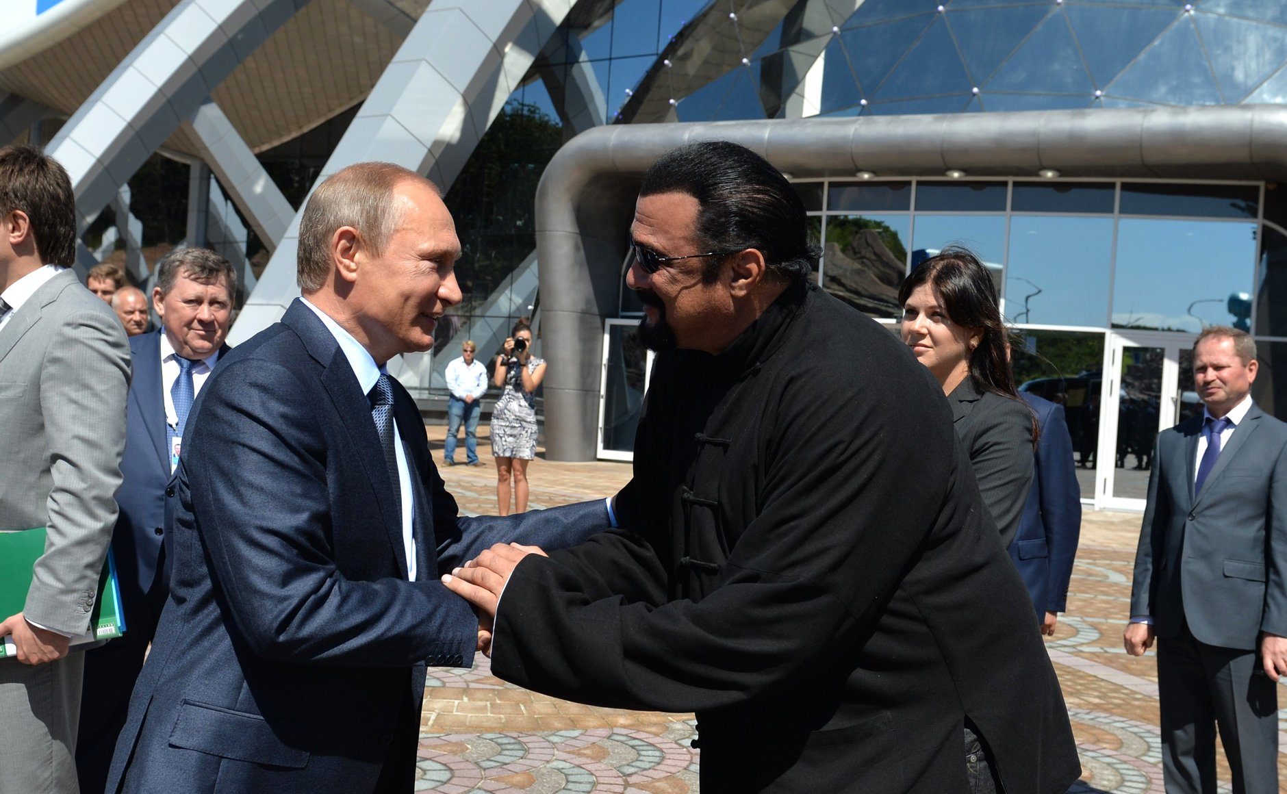 Владимир Путин в океанариуме на острове Русский. В сопровождении губернатора Приморского края Владимира Миклушевского, вице-премьера Госсовета КНР Ван Яна и американского актёра Стивена Сигала